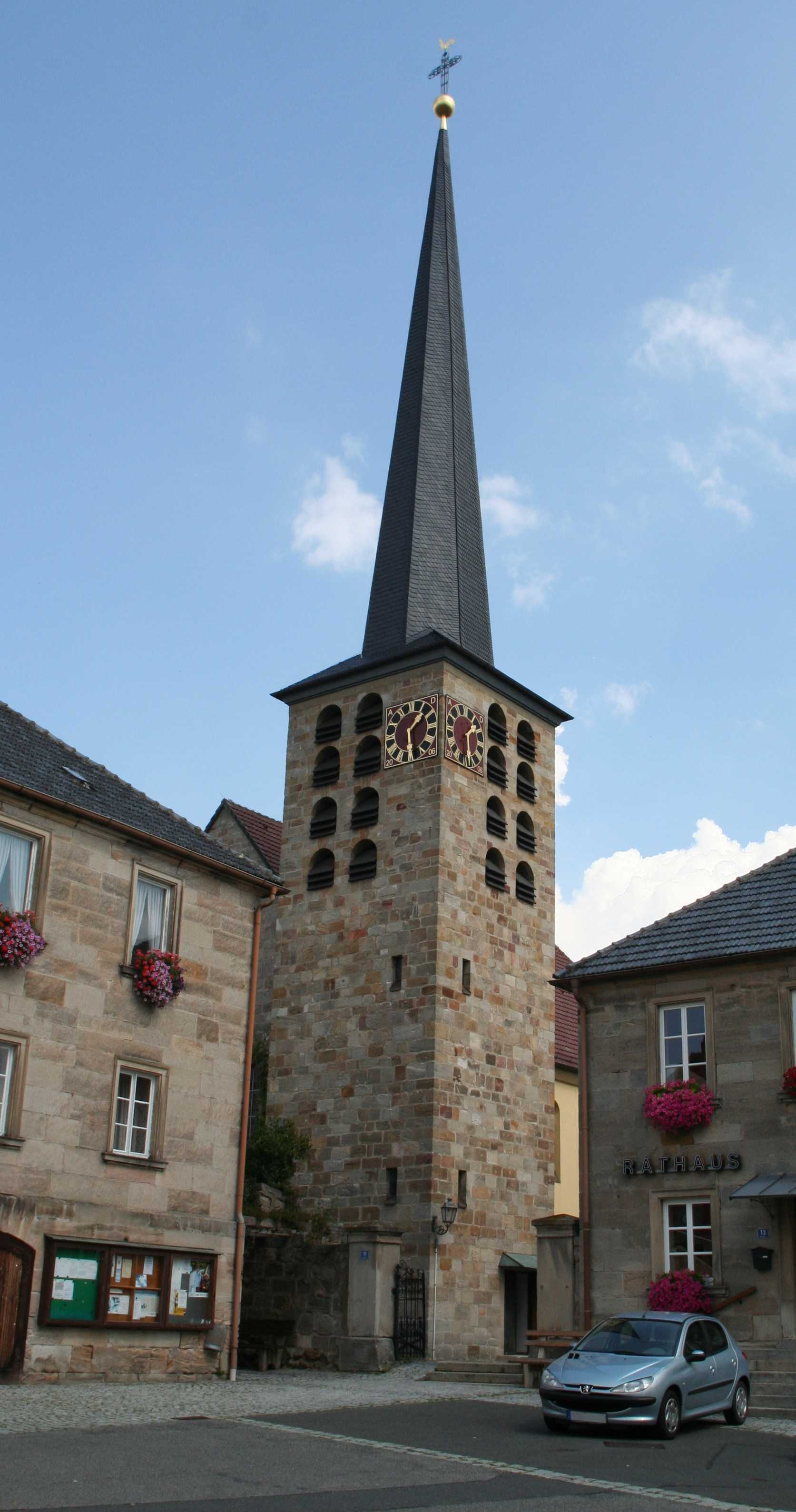 Kath. Pfarrkirche zur Hl. Dreifaltigkeit Marktgraitz im Landkreis Lichtenfels in Bayern